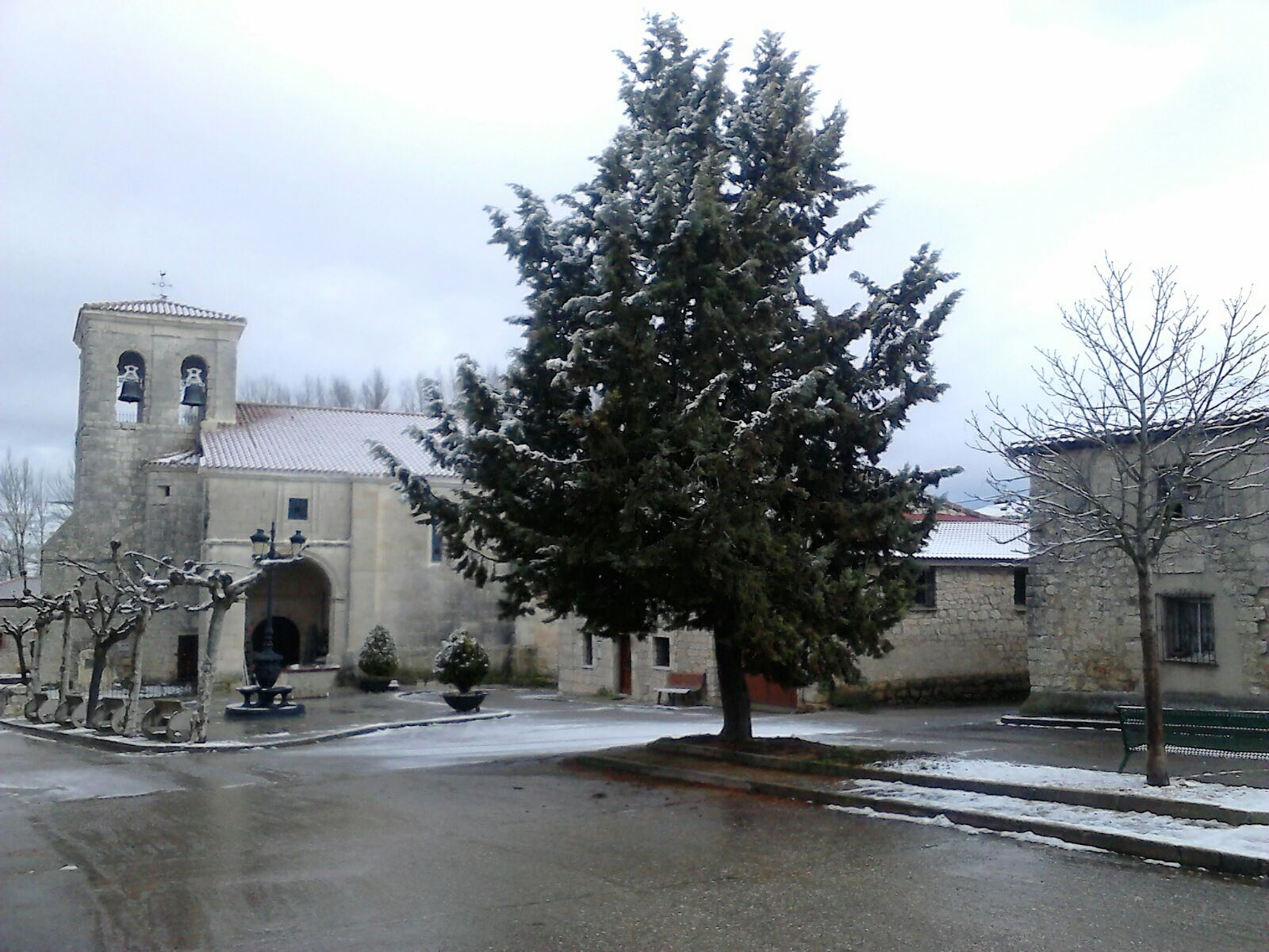 La imagen muestra la Iglesia de Santa María la Mayor datada del siglo XV